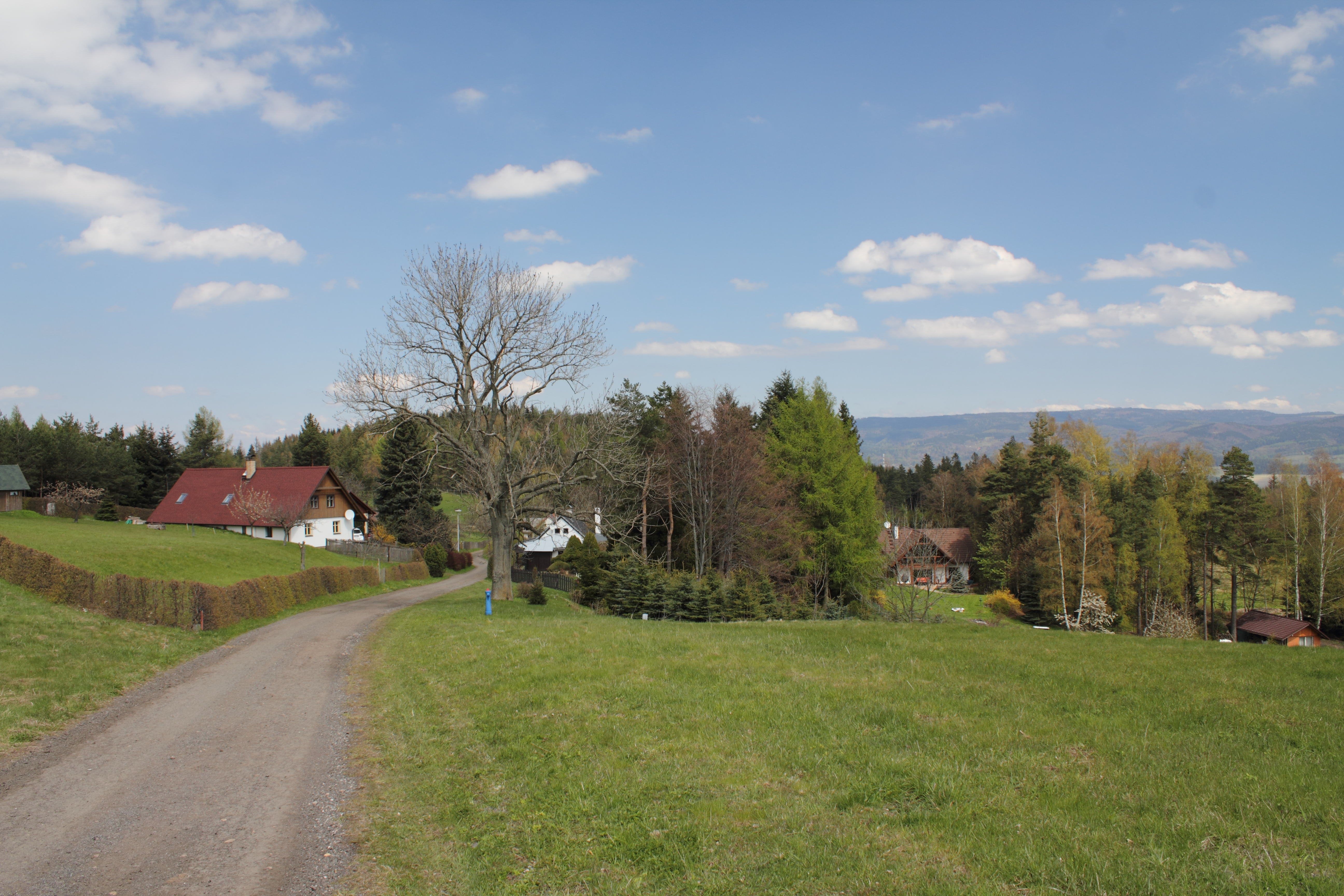 "Polsko", Dobrošov, Náchod